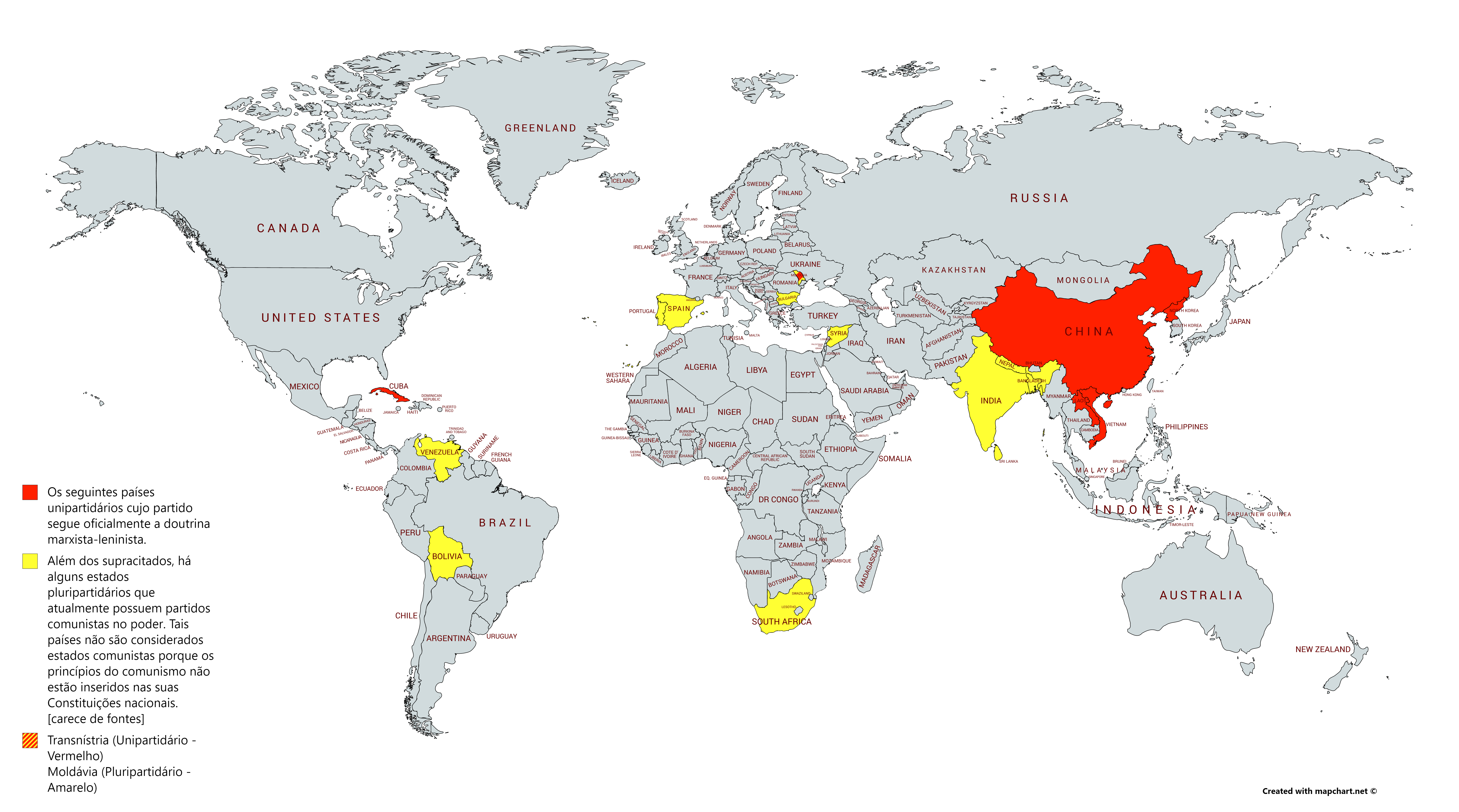 Estados Pluripartidários e Unipartidários no mapa Transnístria e Moldávia estão em duas cores, pois,a Transnístria não é um estado independente.